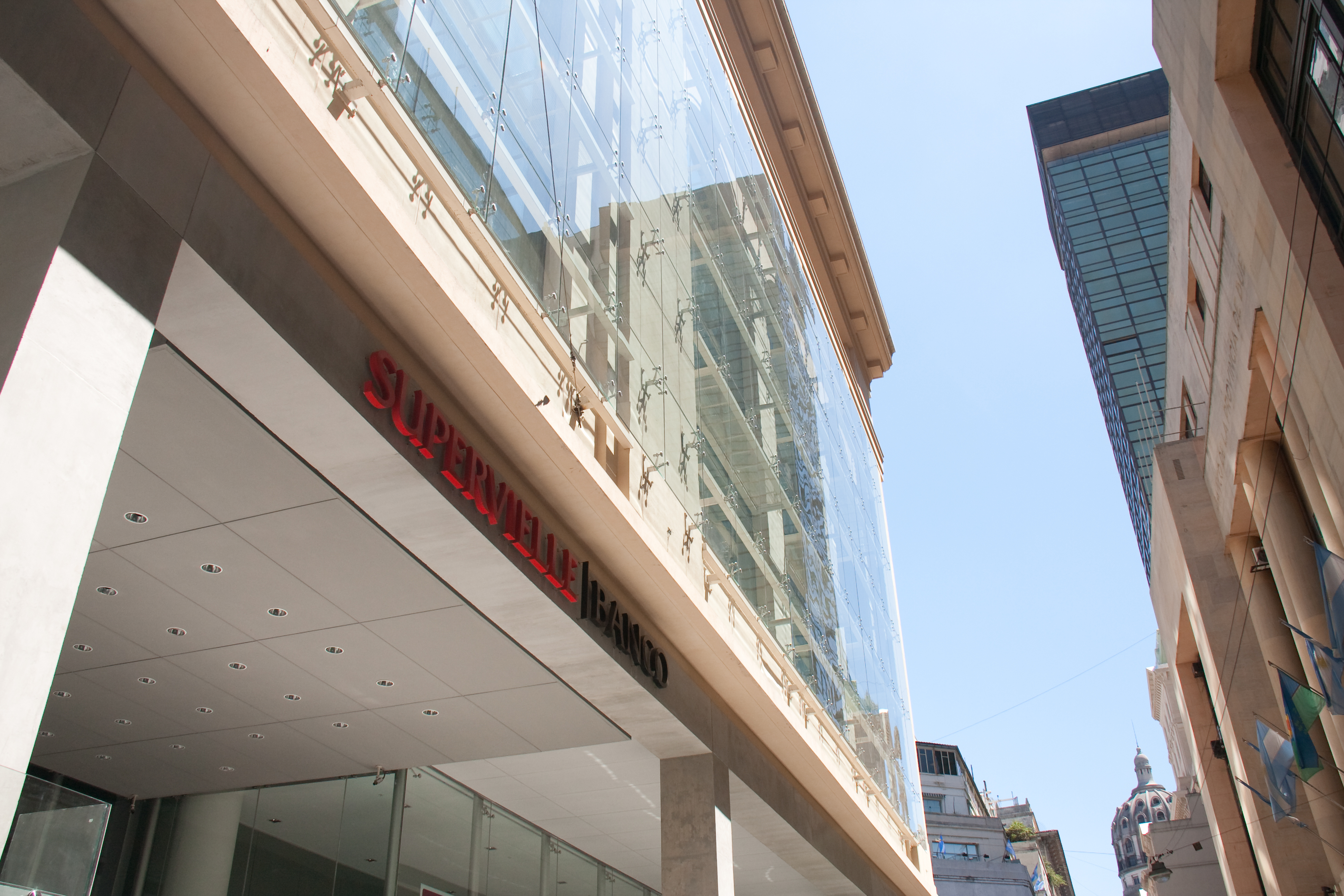 Edificio Corporativo Banco Supervielle - Capital Federal- Buenos Aires - Argentina